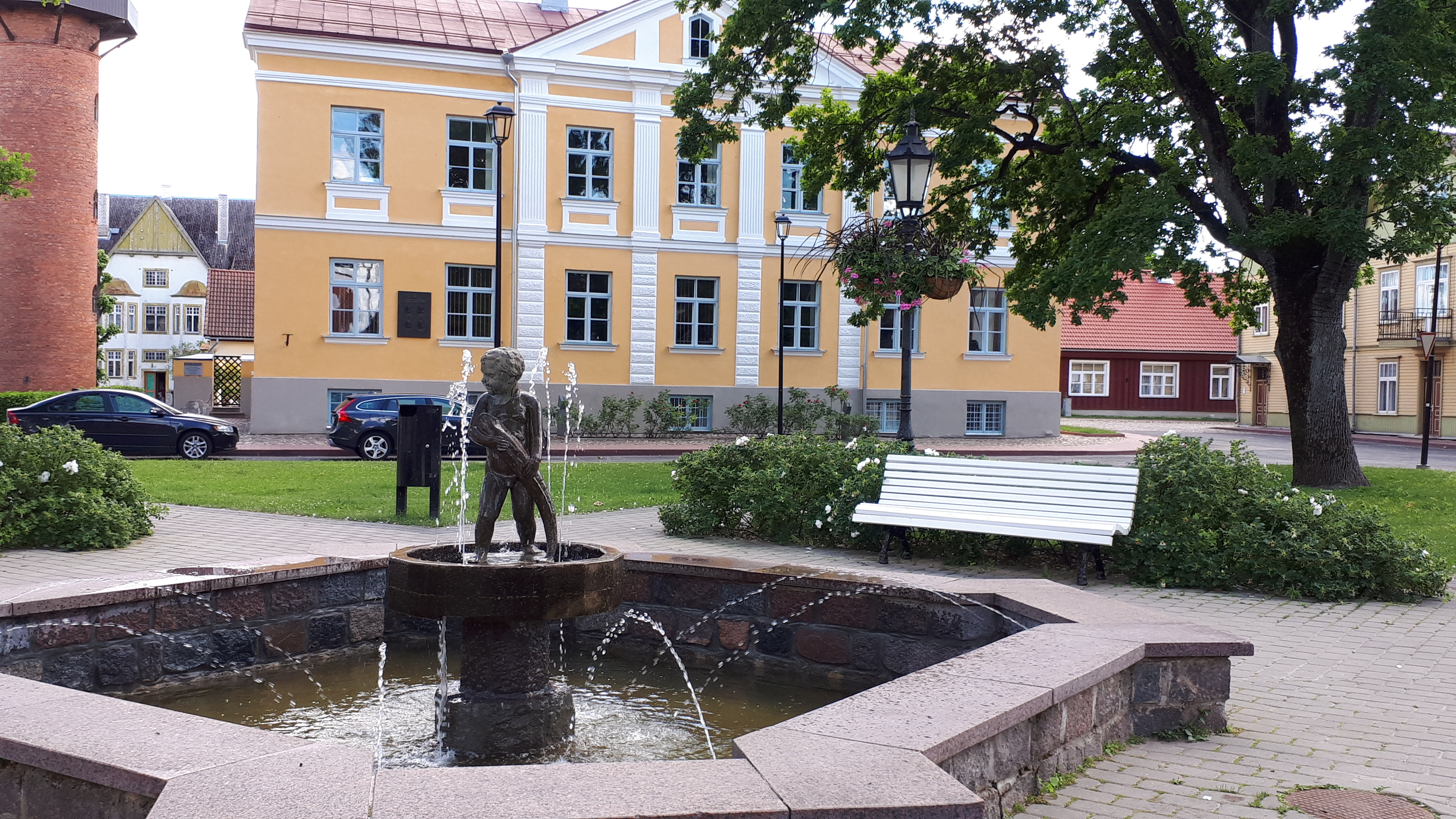 Rynek w Viljandi, Estonia.